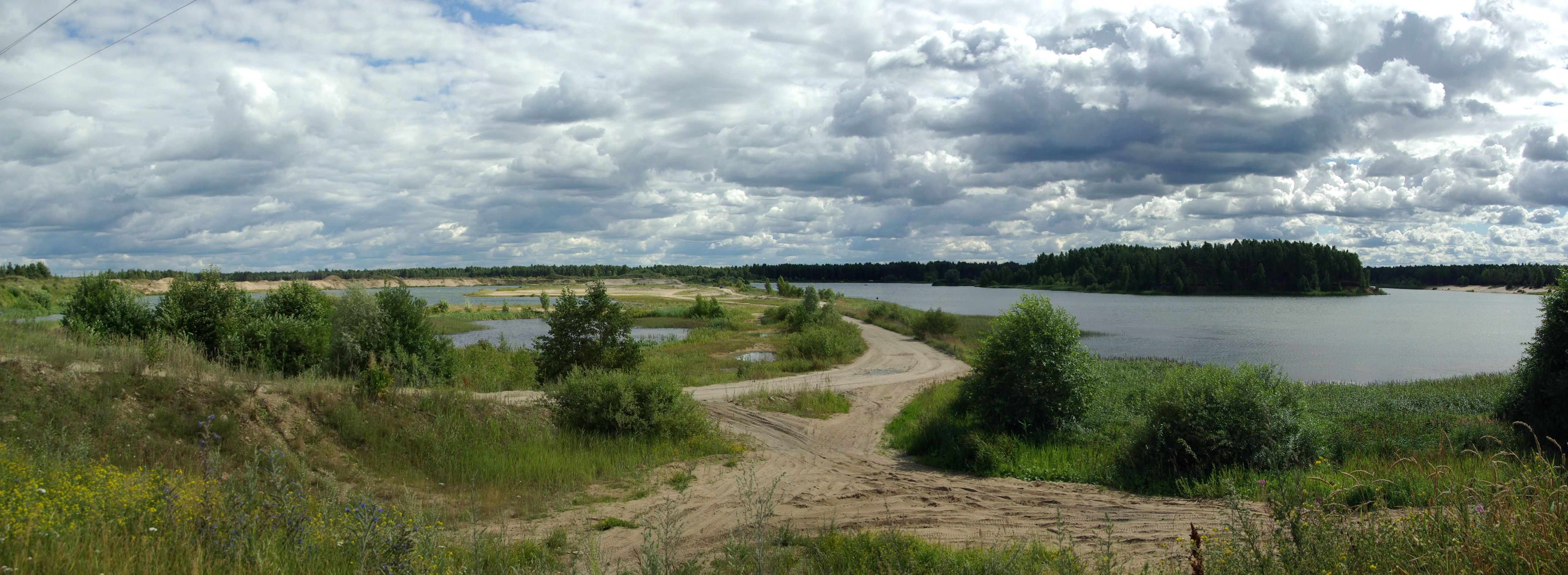 on tehisjärv Harjumaal, Saku vallas, Tammemäe külas